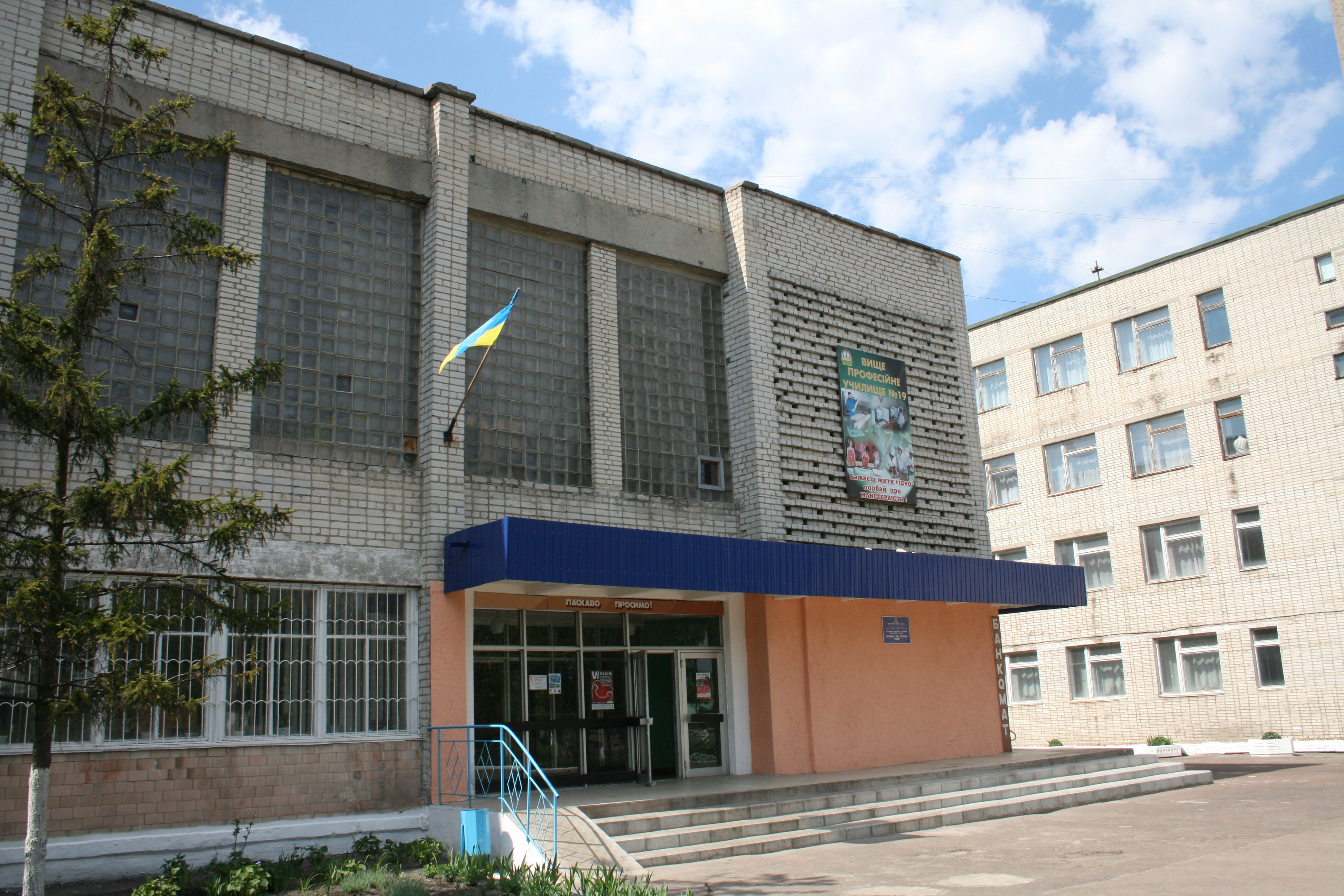 Шостка